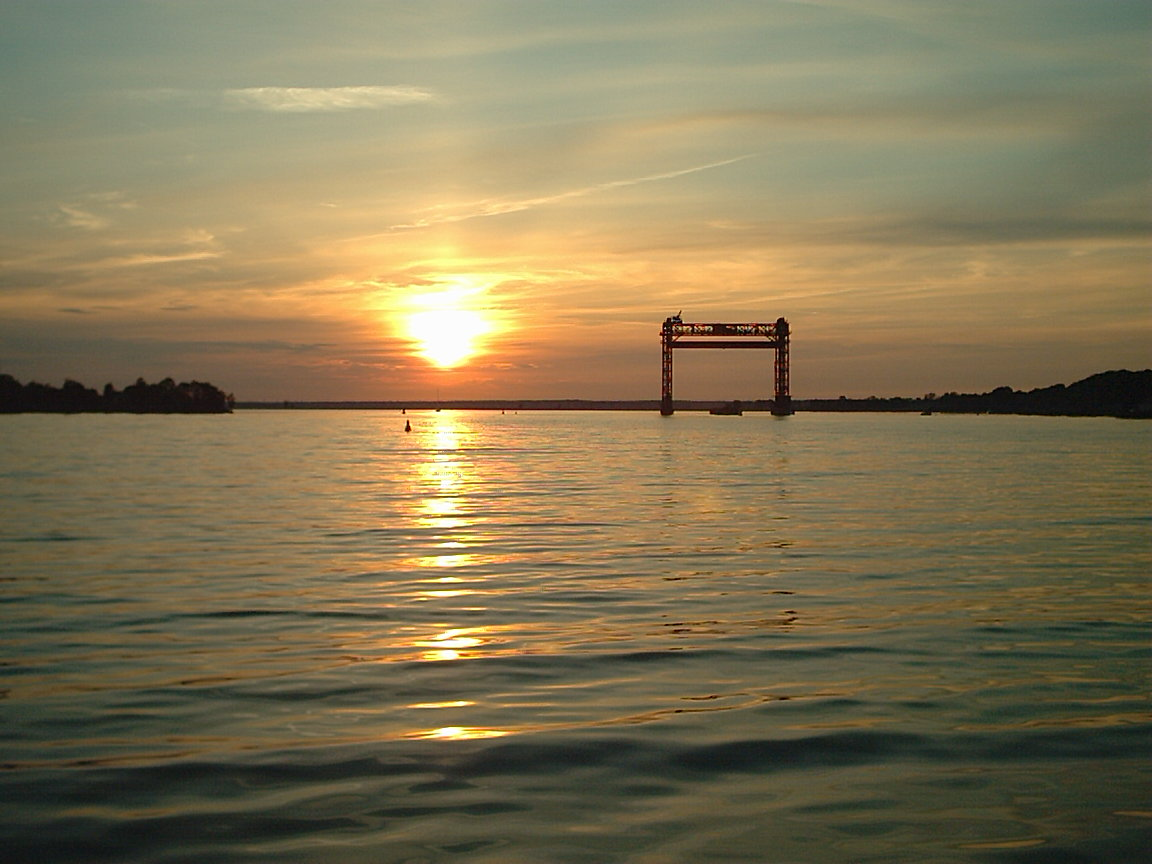 Die Karniner Brücke im Süden des Peenestroms